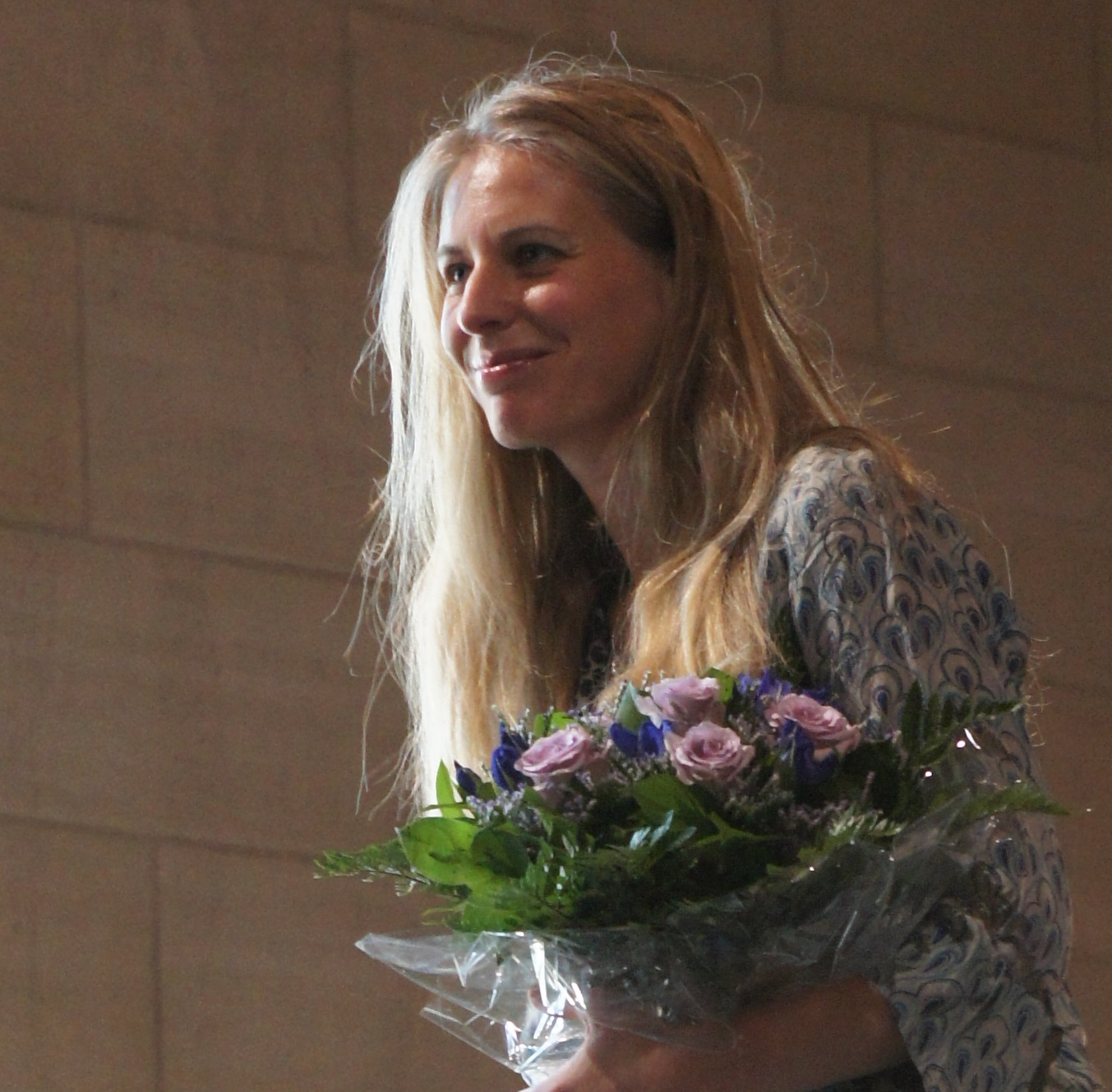 Lors des Flaneries musicales de 2013 en la salle du banquet du palais du Tau.